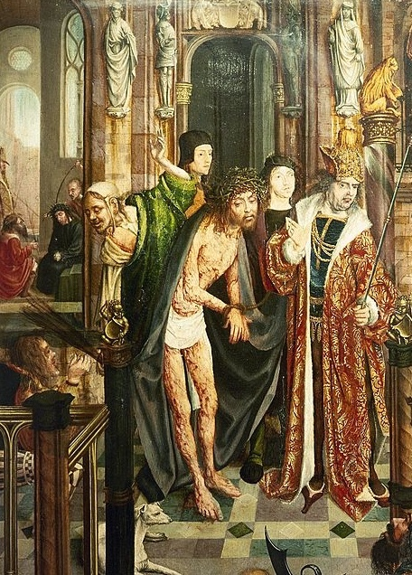 Retable d'Aix-la-Chapelle - Détail Volet gauche - vue de Cologne